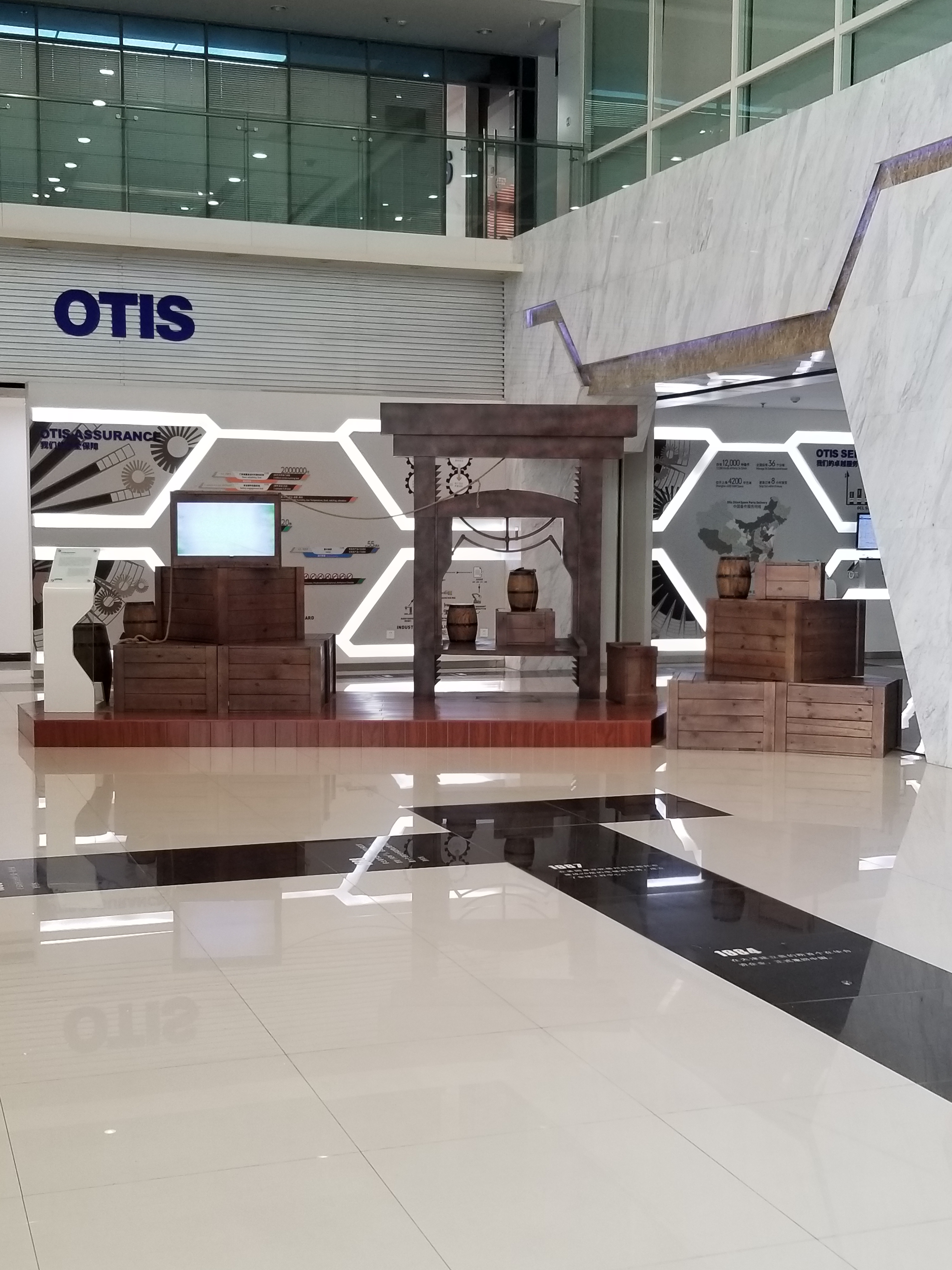 דגם המעלית הראשונה של אלישע אוטיס